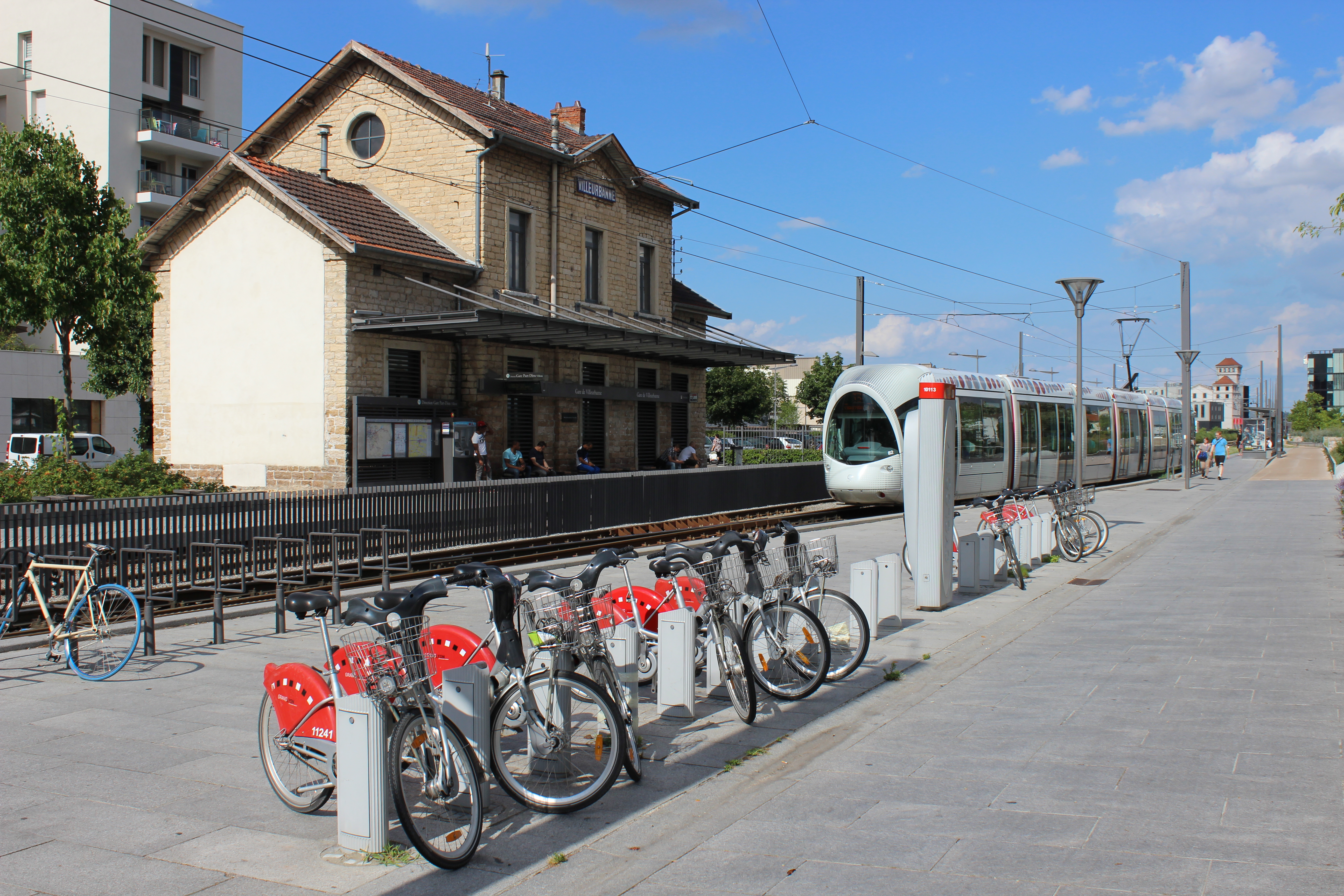 Villeurbanne - Gare de Villeurbanne - Tram et Vélo'v.